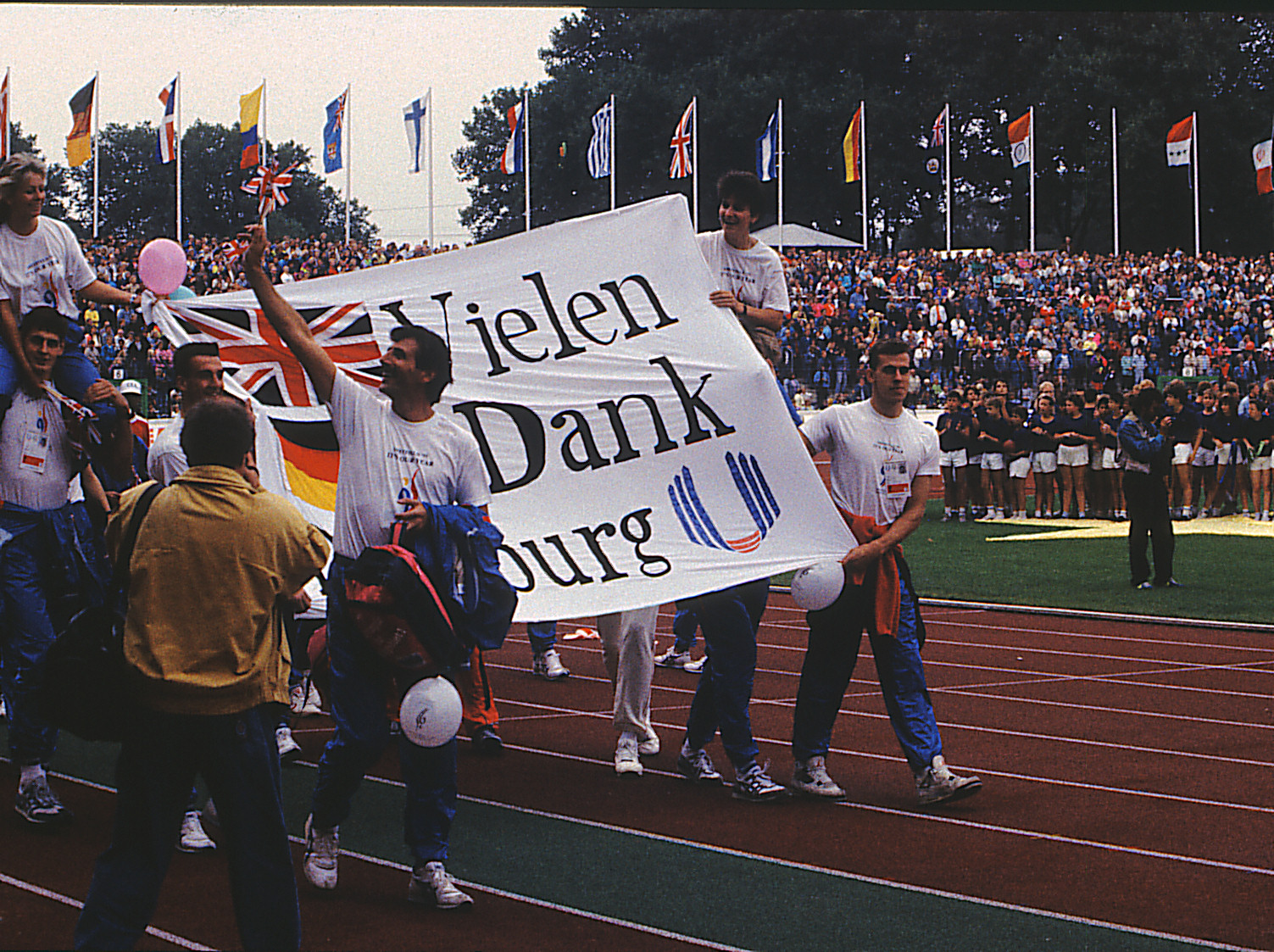 Universiade Duisburg 89